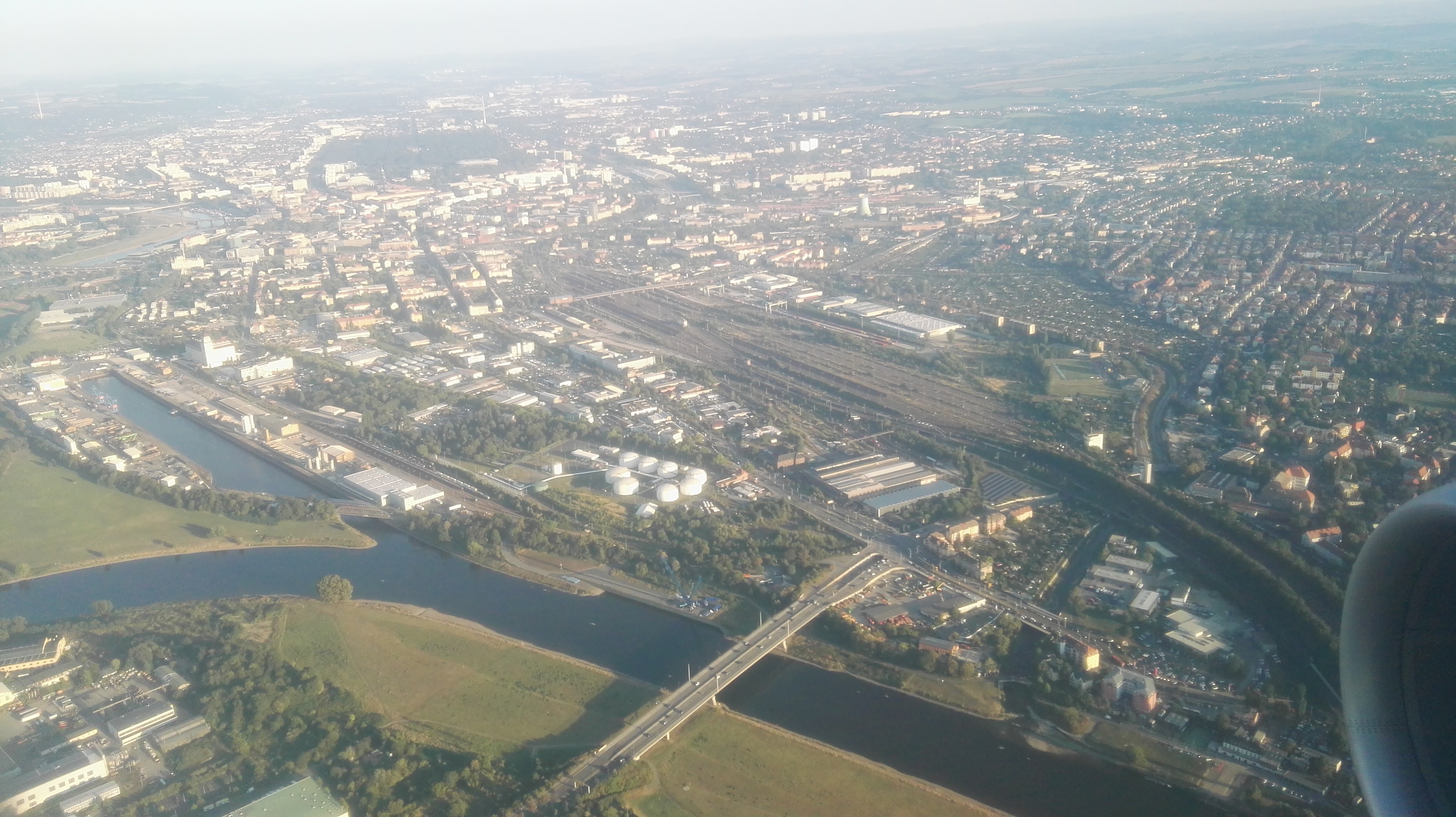 Luftaufnahme von Dresden; Blick zum Bahnhof, Ostragehege